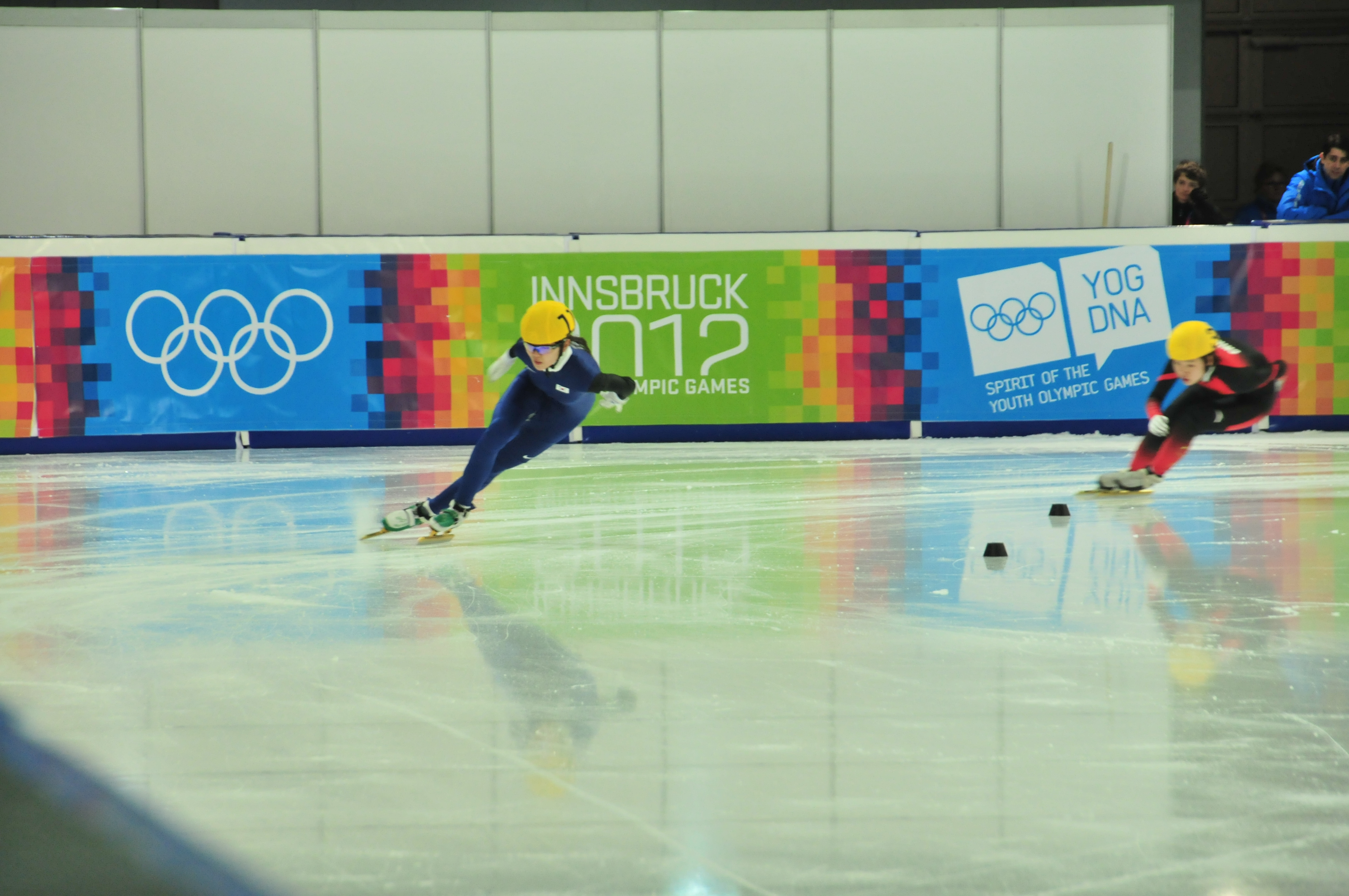 1. Jugendolympiade 2012 Innsbruck. Suk Hee Shim (Südkorea) und Aili Xu (China) von links nach rechts. Short Track Speed Skating Wettbewerb Erste Olympische Jugend- Winterspiele 201213. bis 22. Jänner in Innsbruck Dieses Foto wurde durch die Unterstützung von Wikimedia Österreich und die Twoonix Software GmbH ermöglicht.